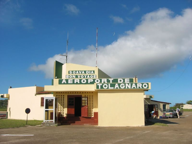 Tolagnaro AirportAeroport de Tolagnaro